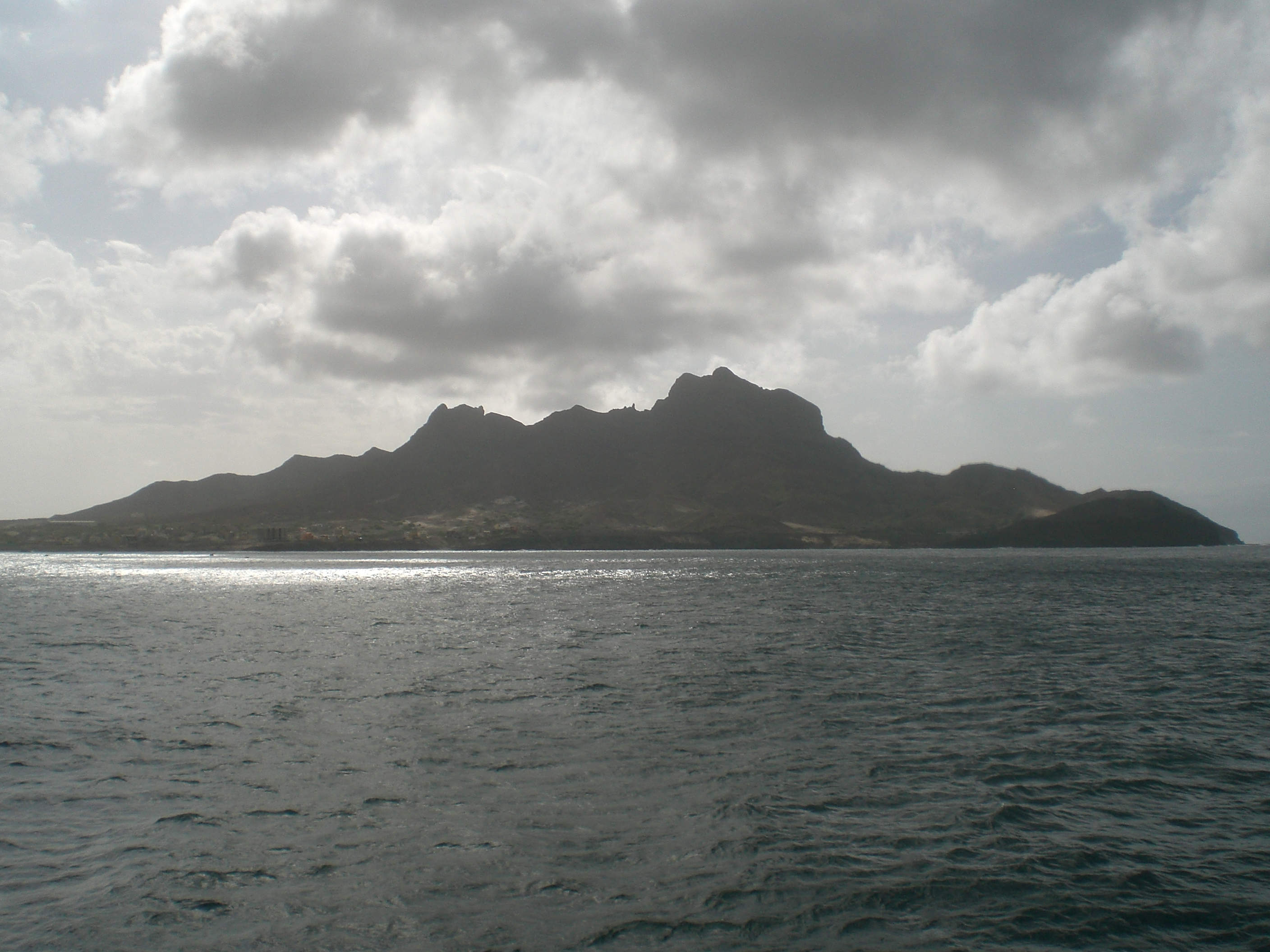 Vista de Monte Cara desde la bahía